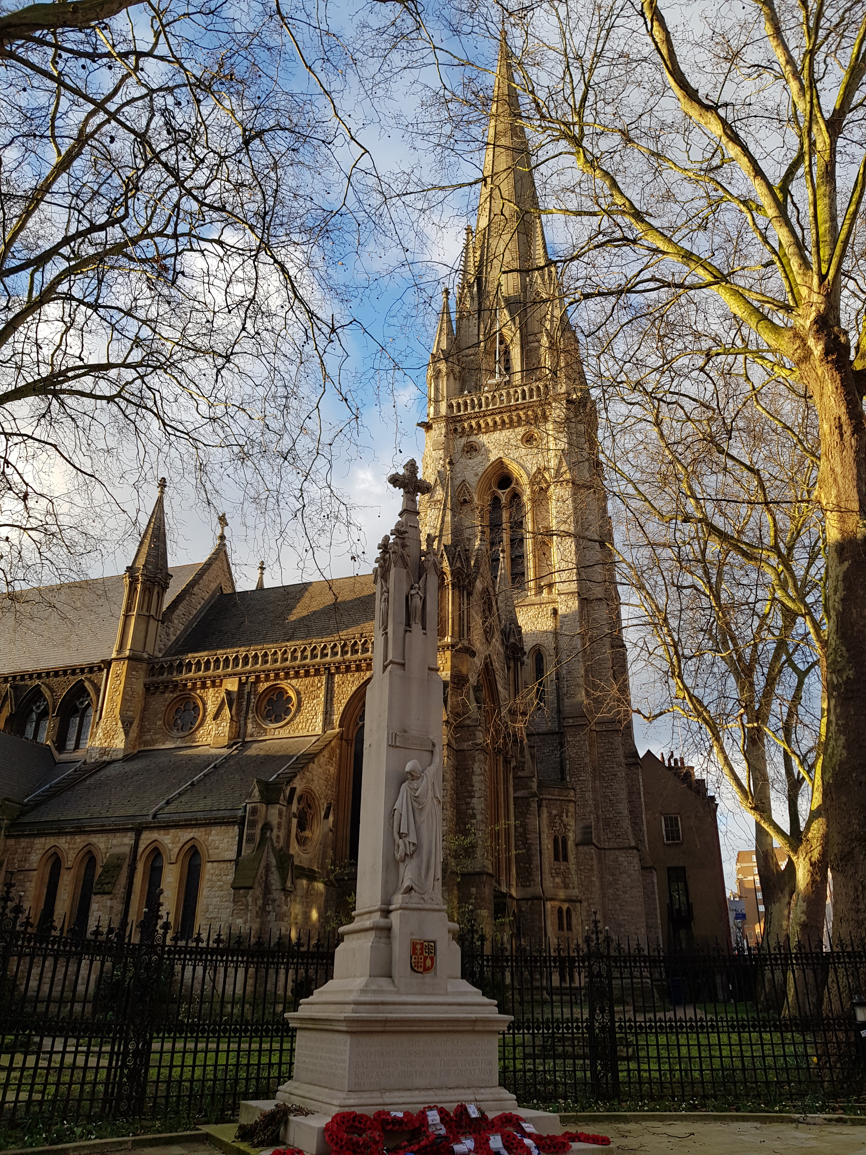 Eglise St Mary Abbots, Kensington, Londres.